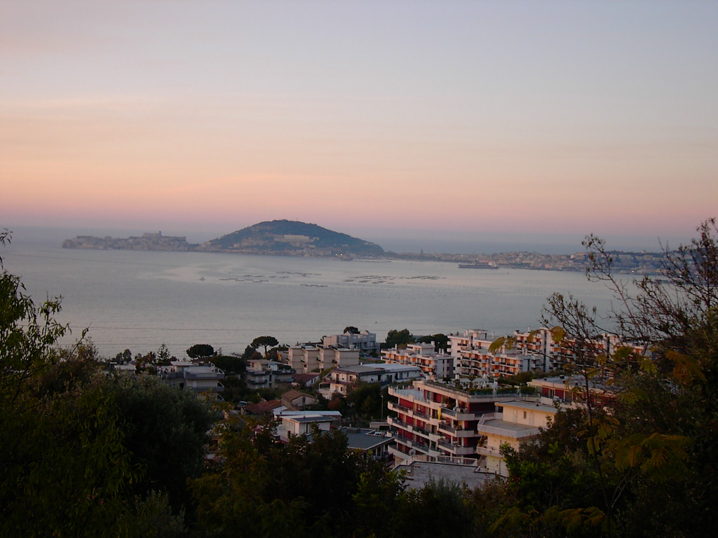 Formia, Lazio, Italy.